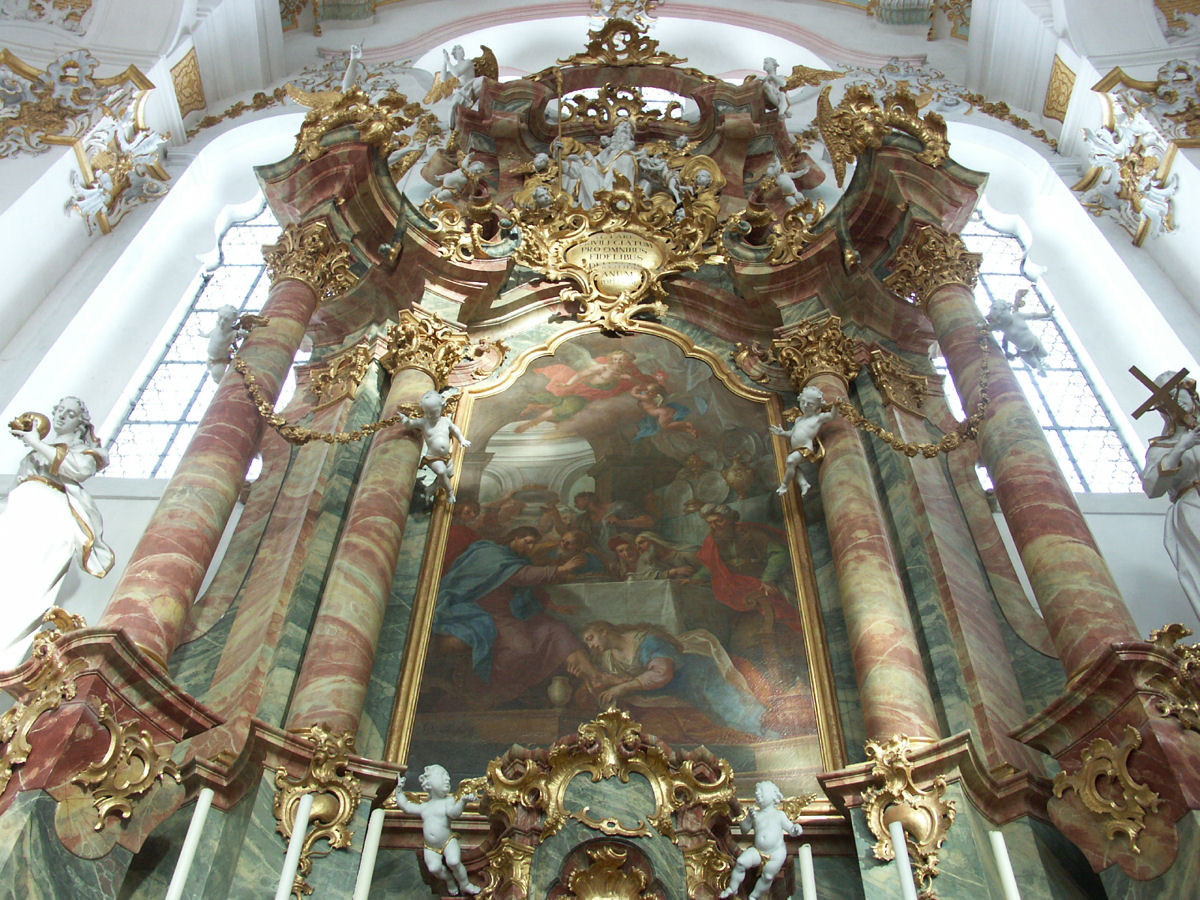 Wies church (Wieskirche), Germany